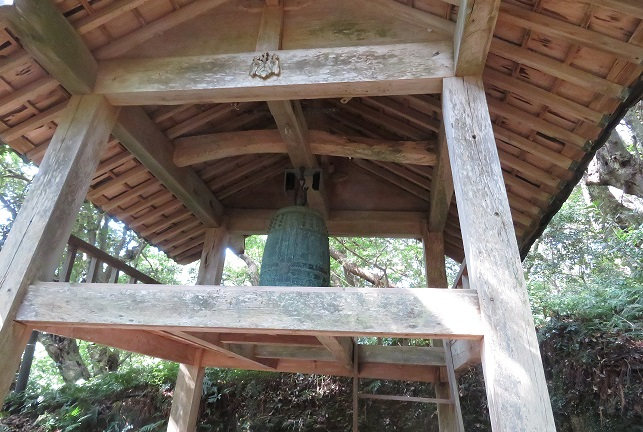 多久頭魂神社梵鐘